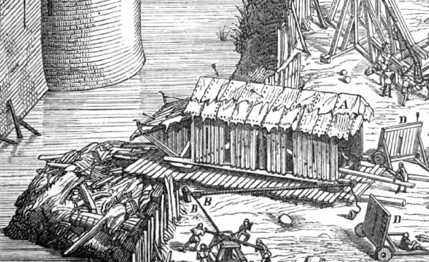 Abbildung einer Katze (Belagerungsmaschine)